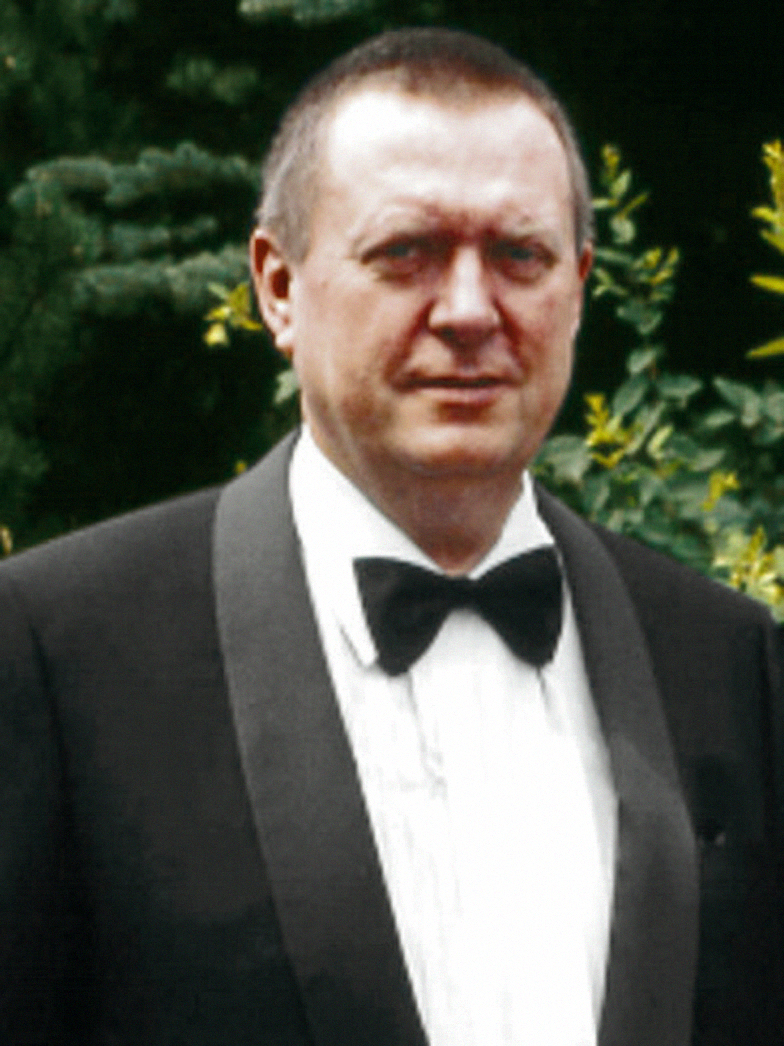 Prof. Dr. med. Claus Claussen (* 1939), Neurootologe